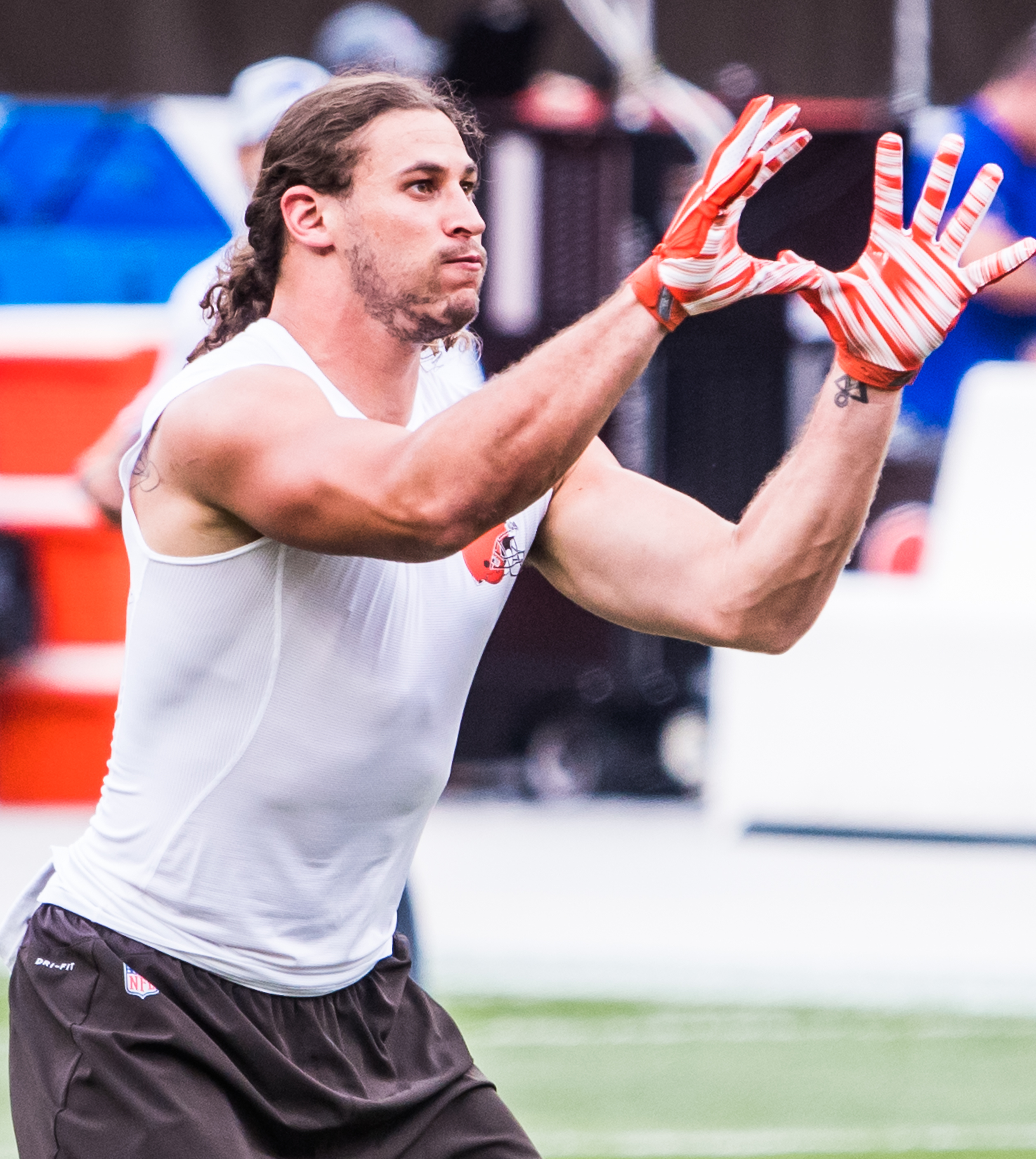 Devon Cajuste